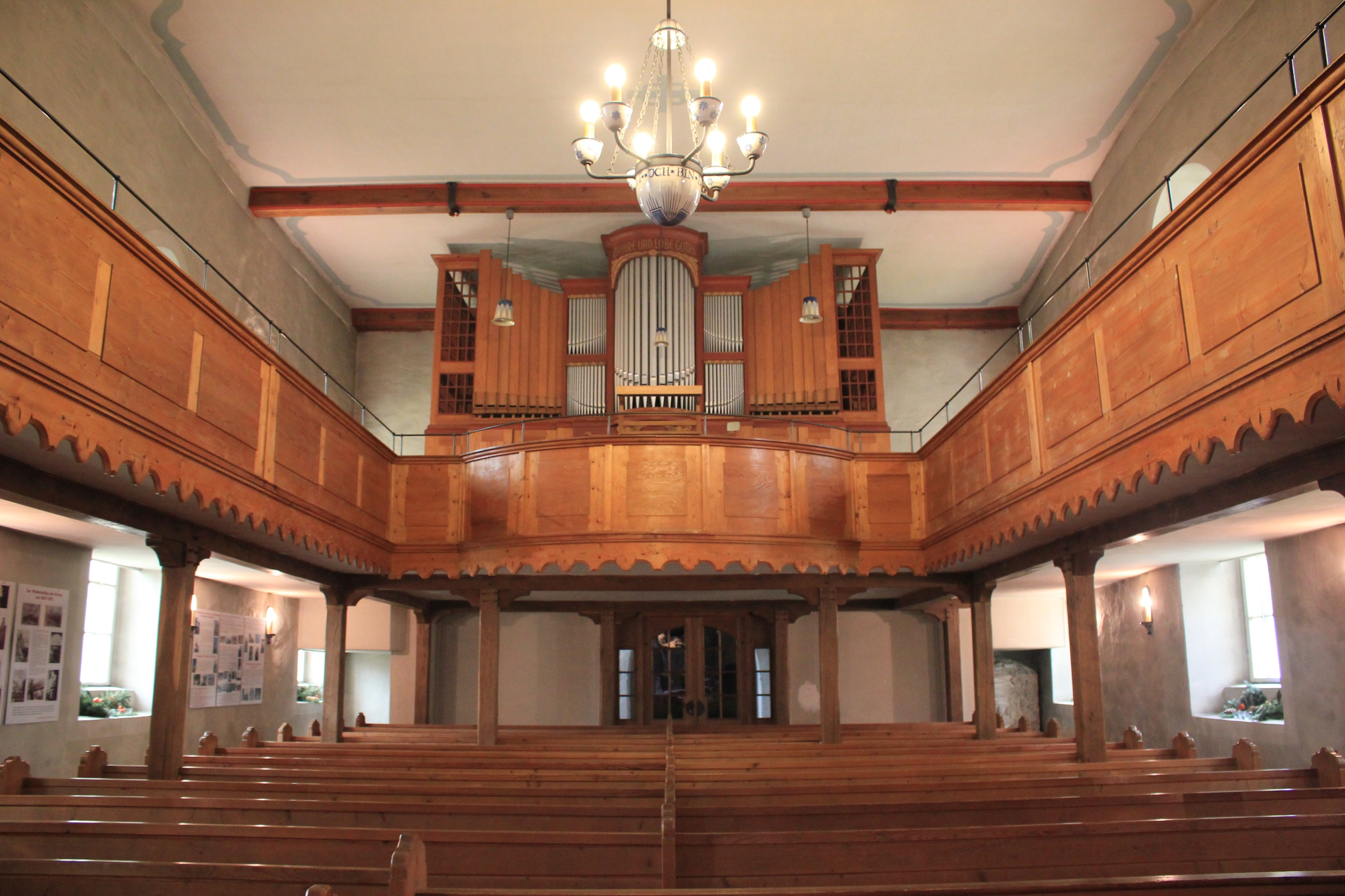 Hornjoserbsce: W Njeswačanskej cyrkwi.